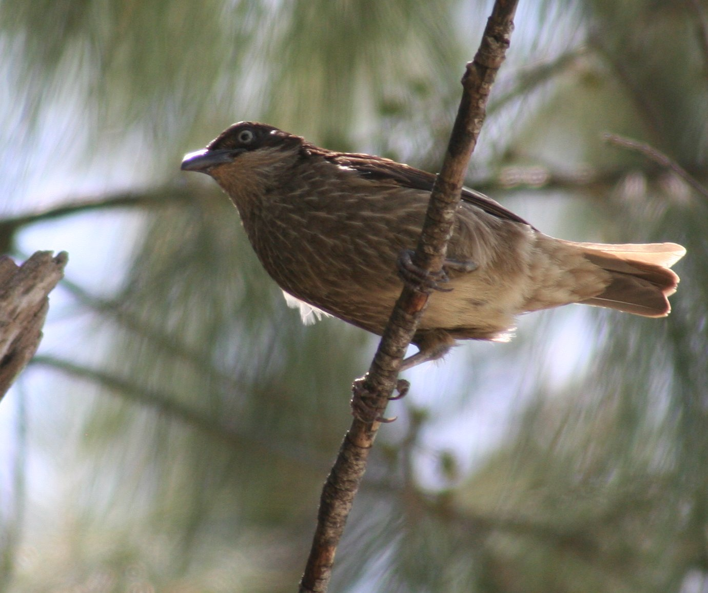 Polynesian Starling Aplonis tabuensis in Nuku 'Alofa, Tonga